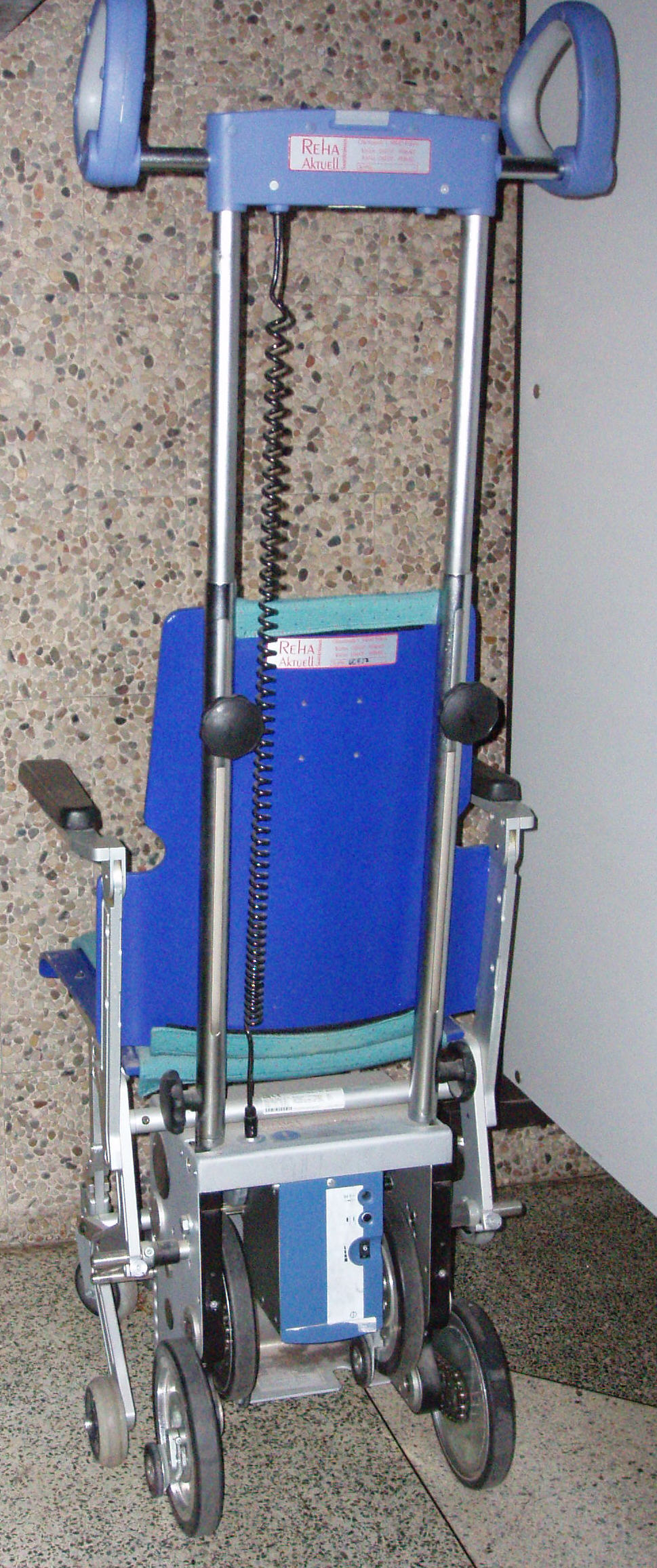 Scalamobil